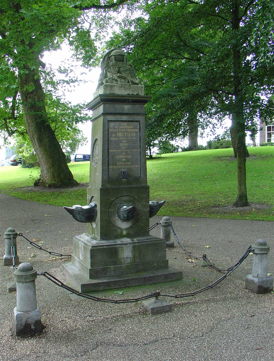 Cornelis en Frederik de Houtman door Franciscus Xaverius Stracké - Houtmansplantsoen Gouda